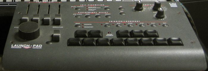 E-mu Launch Pad (1996) — MIDI Controller for Orbit dance sound module (1995)